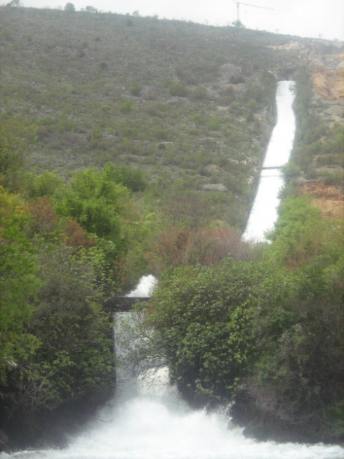 Vodopad na Jasenici